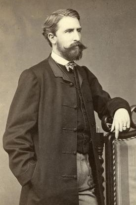 Tóth Vilmos belügyminiszter